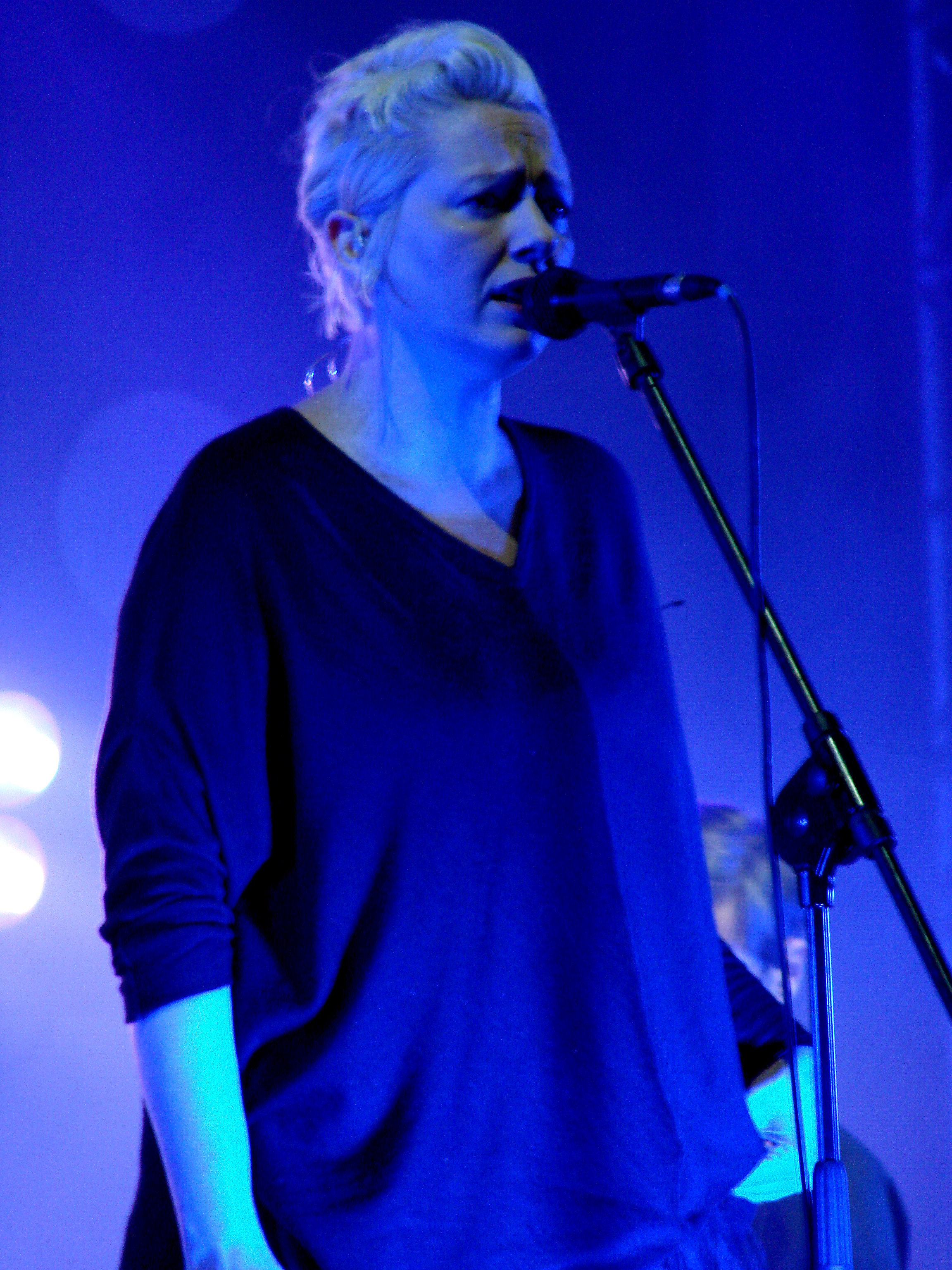 Festiwal odbył się w dniach 30-31 lipca 2010 w Chorzowie na terenie Pól Marsowych w WPKiW.